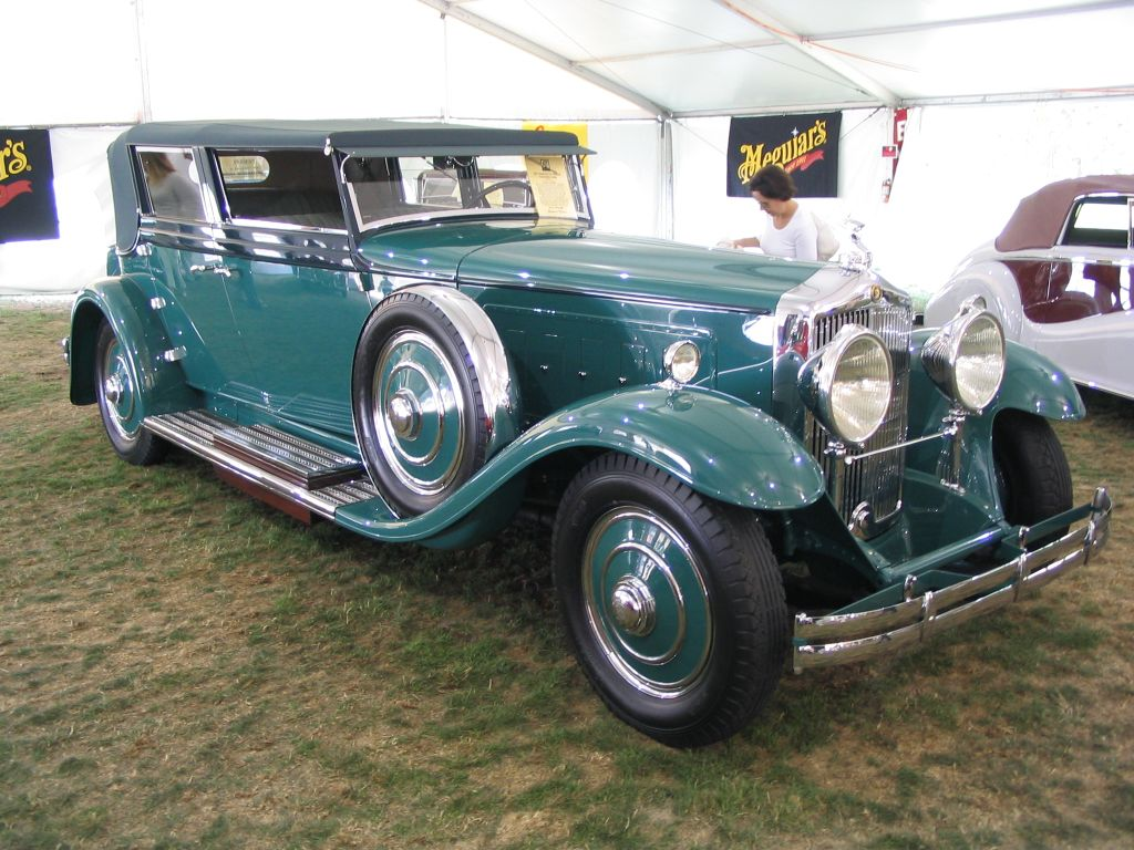 Minerva 8 Al Rollston Baujahr 1931, fotografiert von Ramgeis in Pebble Beach, Kalifornien im August 2004, GNU-FDL first upload in de wikipedia on 05:37, 17. Okt 2004 by Ramgeis